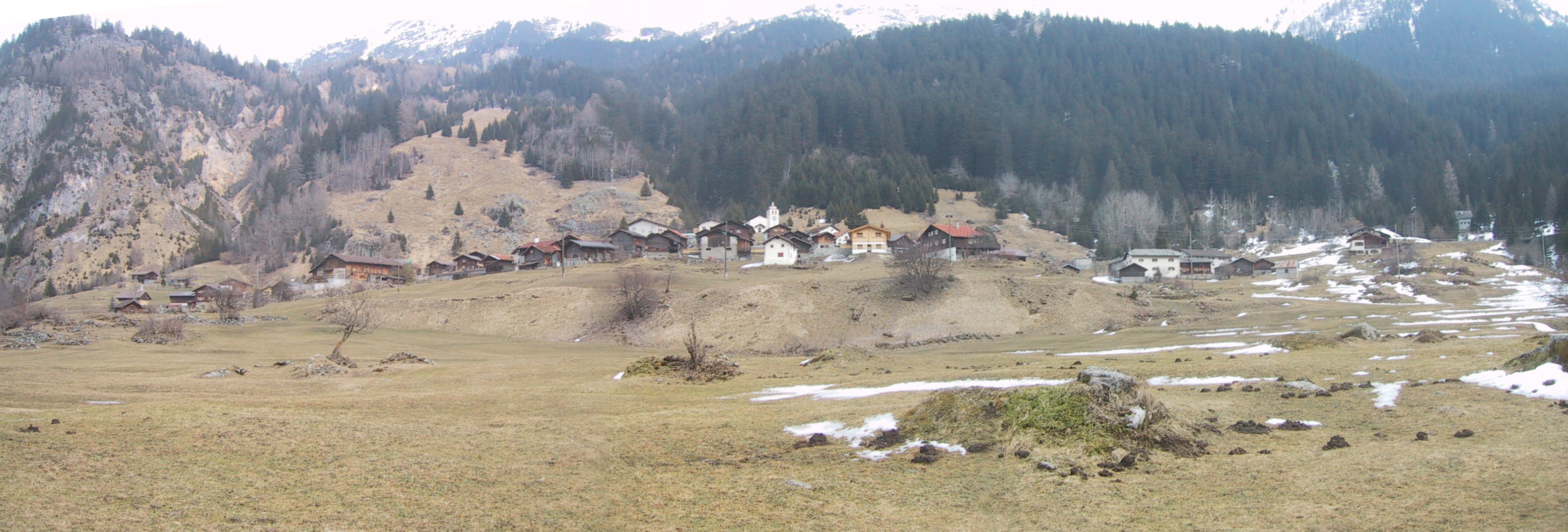 Das Dorf Ausserferrera, Kanton Graubünden / Schweiz